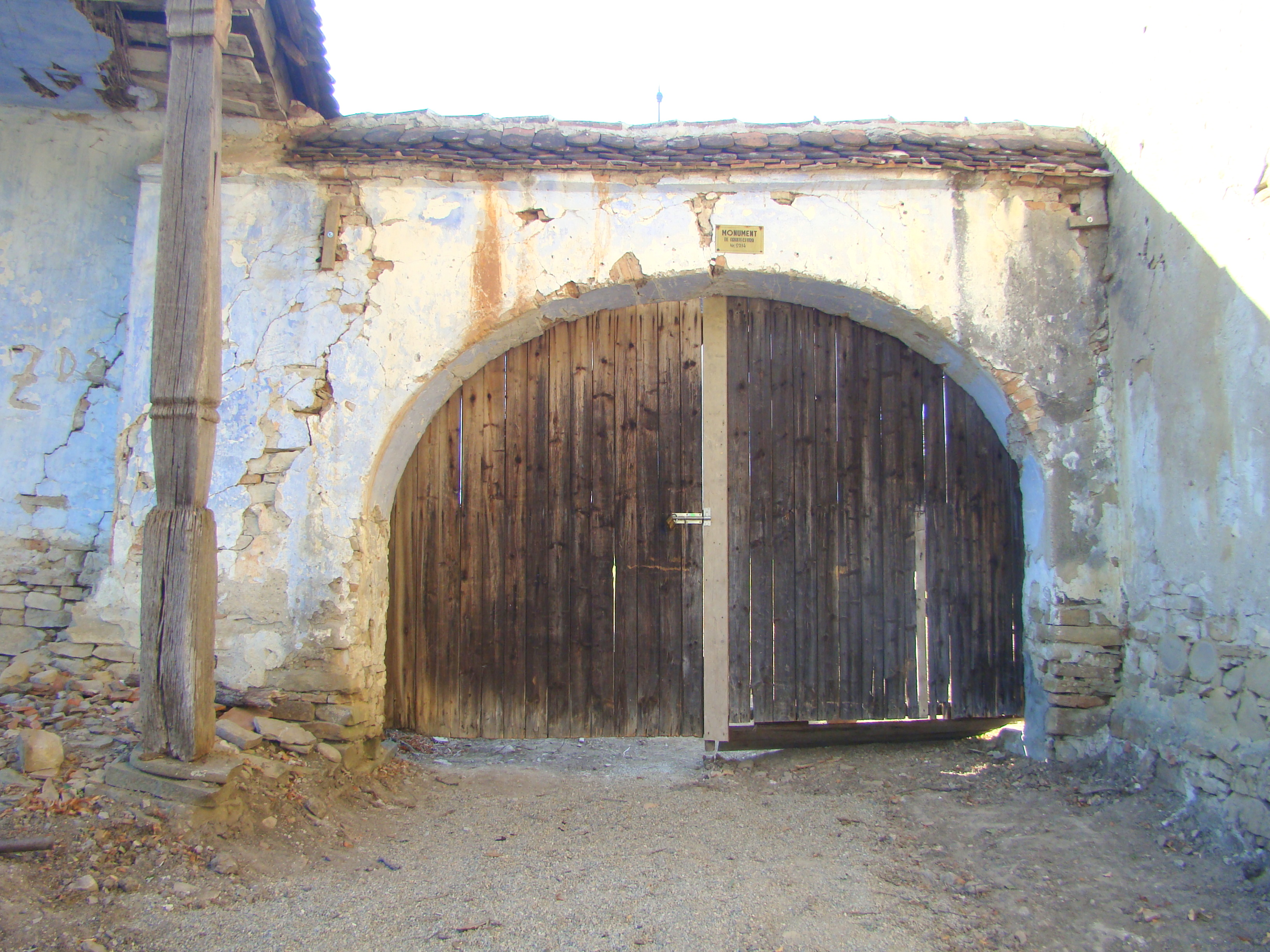 Biserica evanghelică, sat Rodbav; comuna Șoarș 115 sec. XIII-XIX